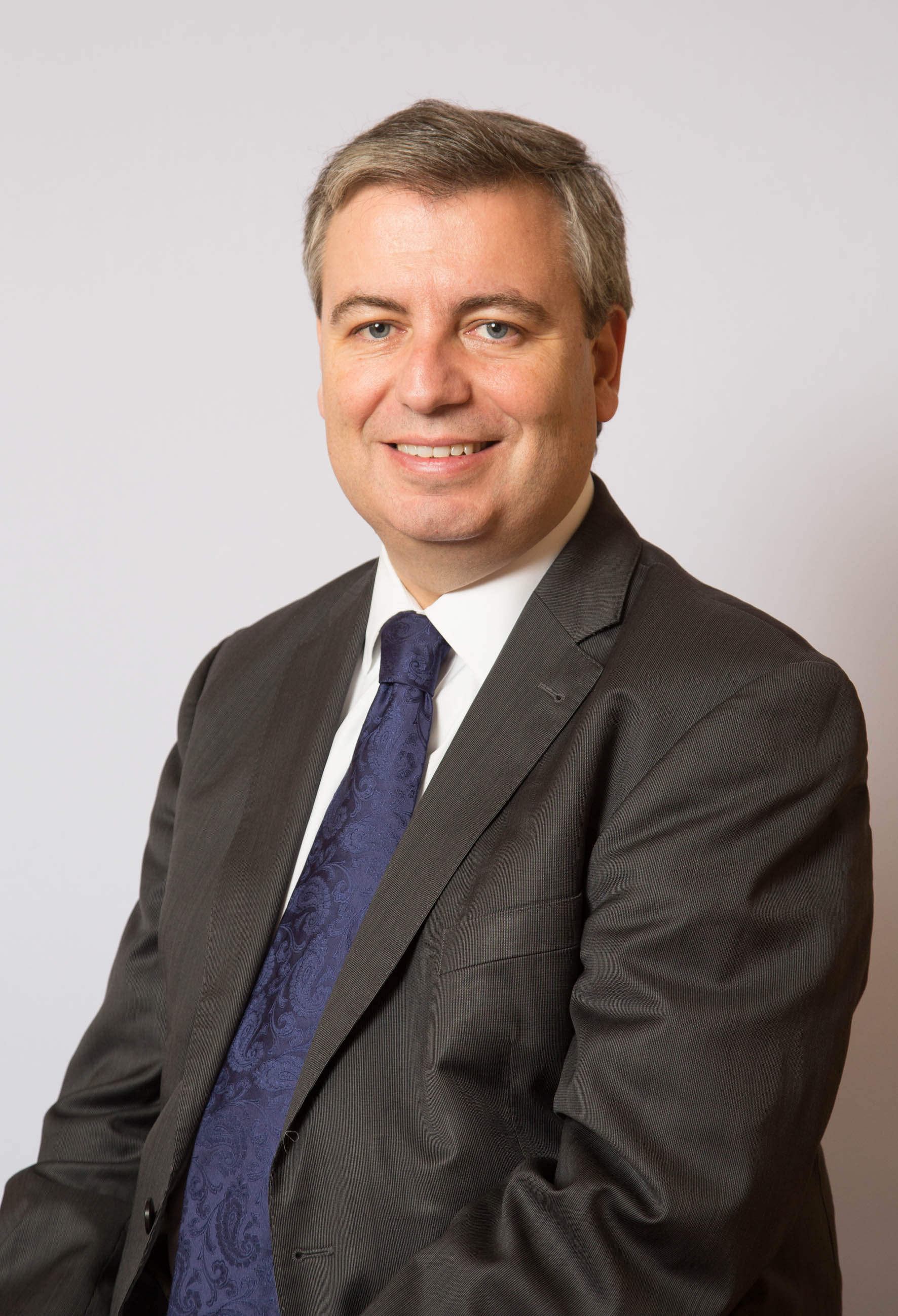 Candidats Eleccions Generals 2015 Jordi Xuclà